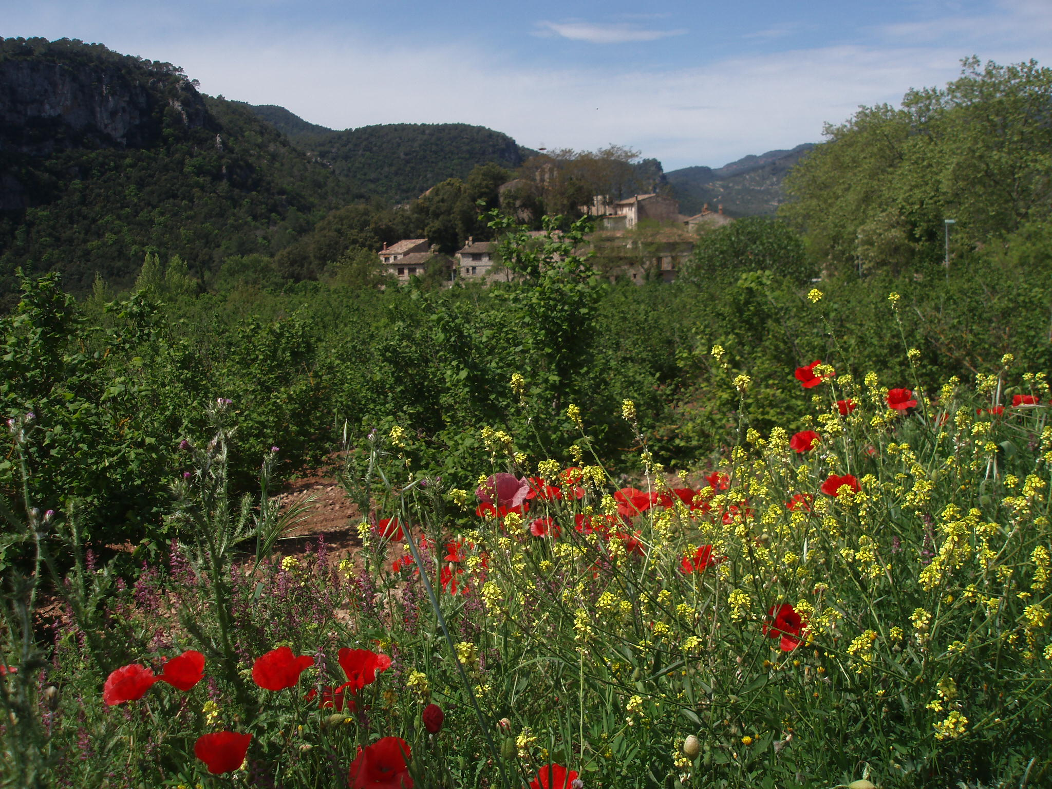 Farena a la primavera